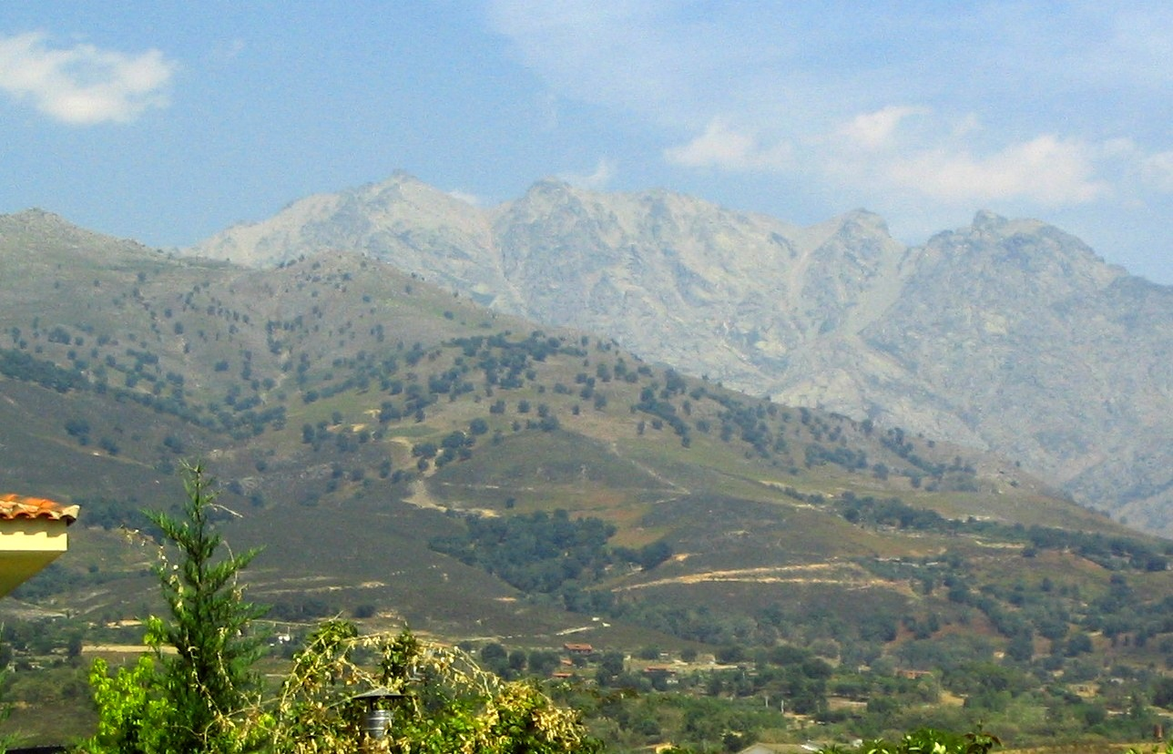 Cara sur del Pico Almanzor (España).